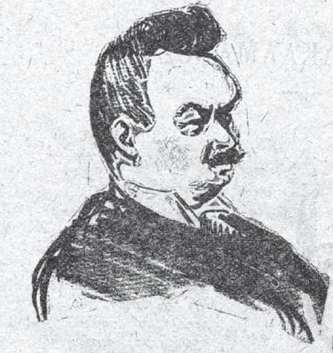 Künstlerkarikatur, Teil eines Kohlenstiftzyklus für die griechische Literaturzeitung Estia